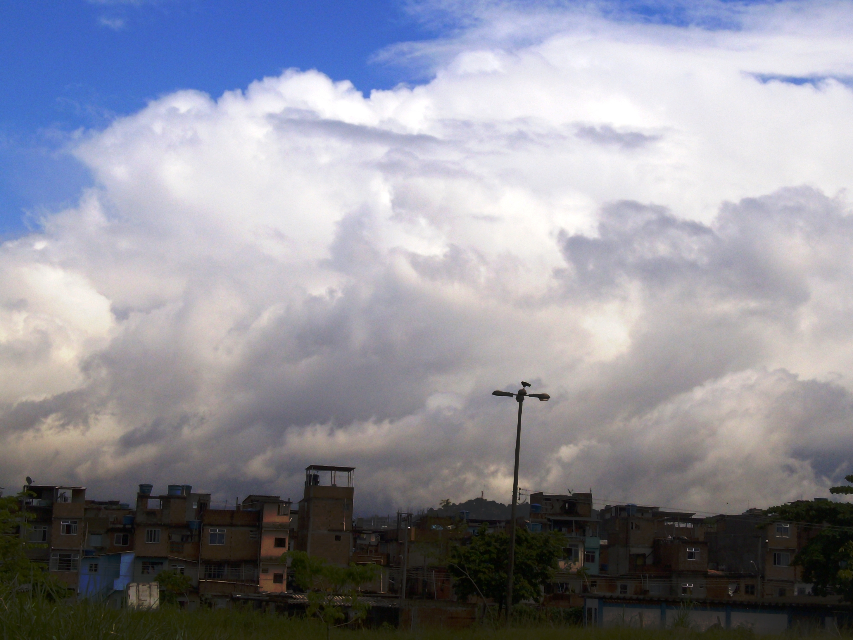 Complexo da Maré, Rio de Janeiro (RJ), Brasil: pormenor a partir da Linha Vermelha.